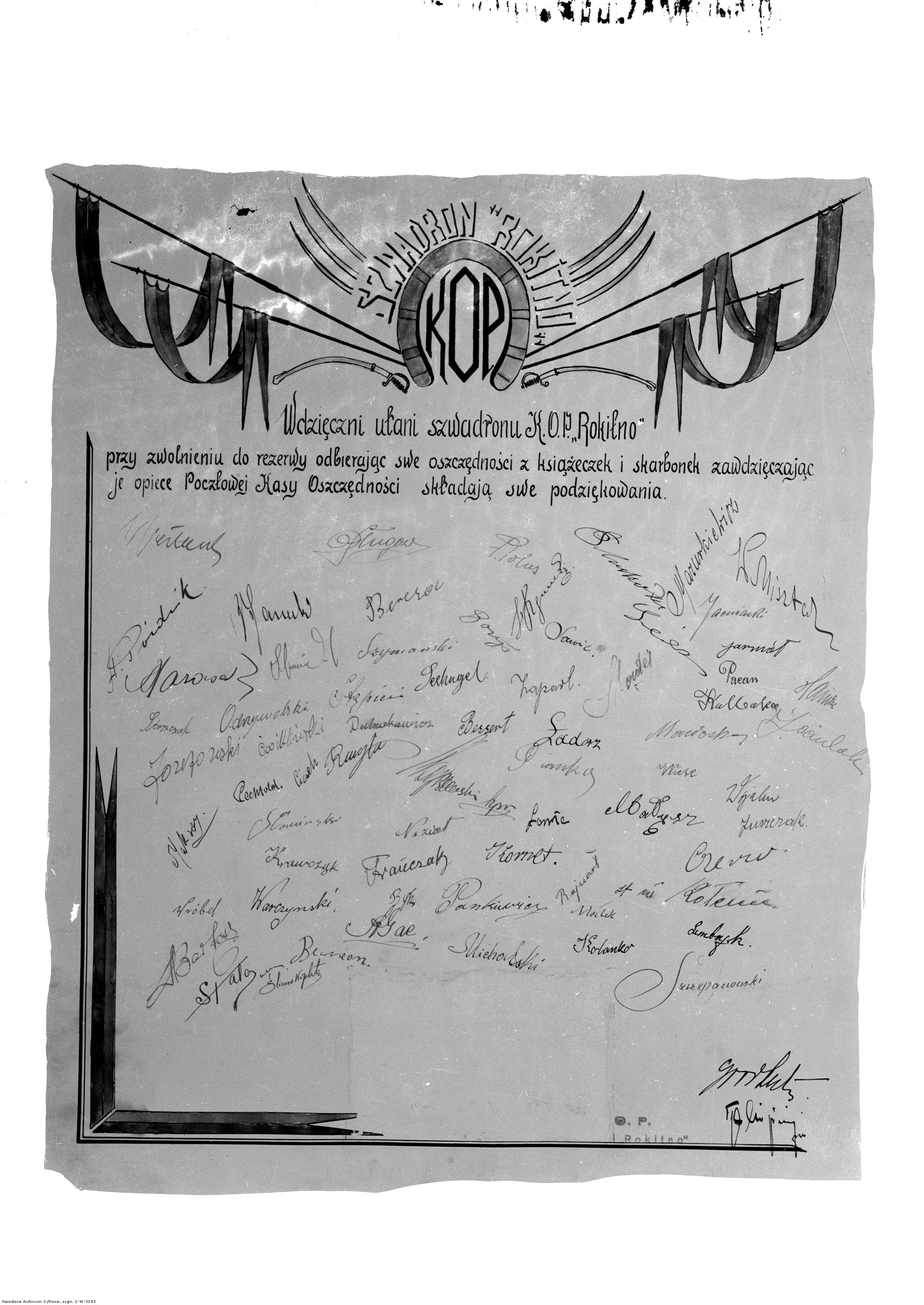 Fotokopia podziękowania ułanów szwadronu Korpusu Ochrony Pogranicza "Rokitno" dla Pocztowej Kasy Oszczędności. Koncern Ilustrowany Kurier Codzienny - Archiwum Ilustracji. Sygnatura: 1-W-3143